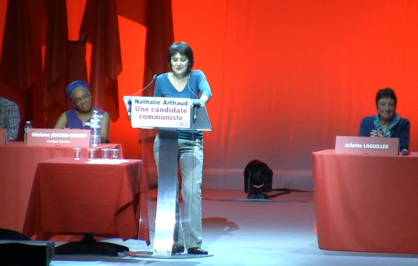 Nathalie Arthaud, Arlette Laguiller et Ghislaine Joachim-Arnaud au meeting de Lutte Ouvrière au Zénith de Paris le dimanche 15 avril 2012.